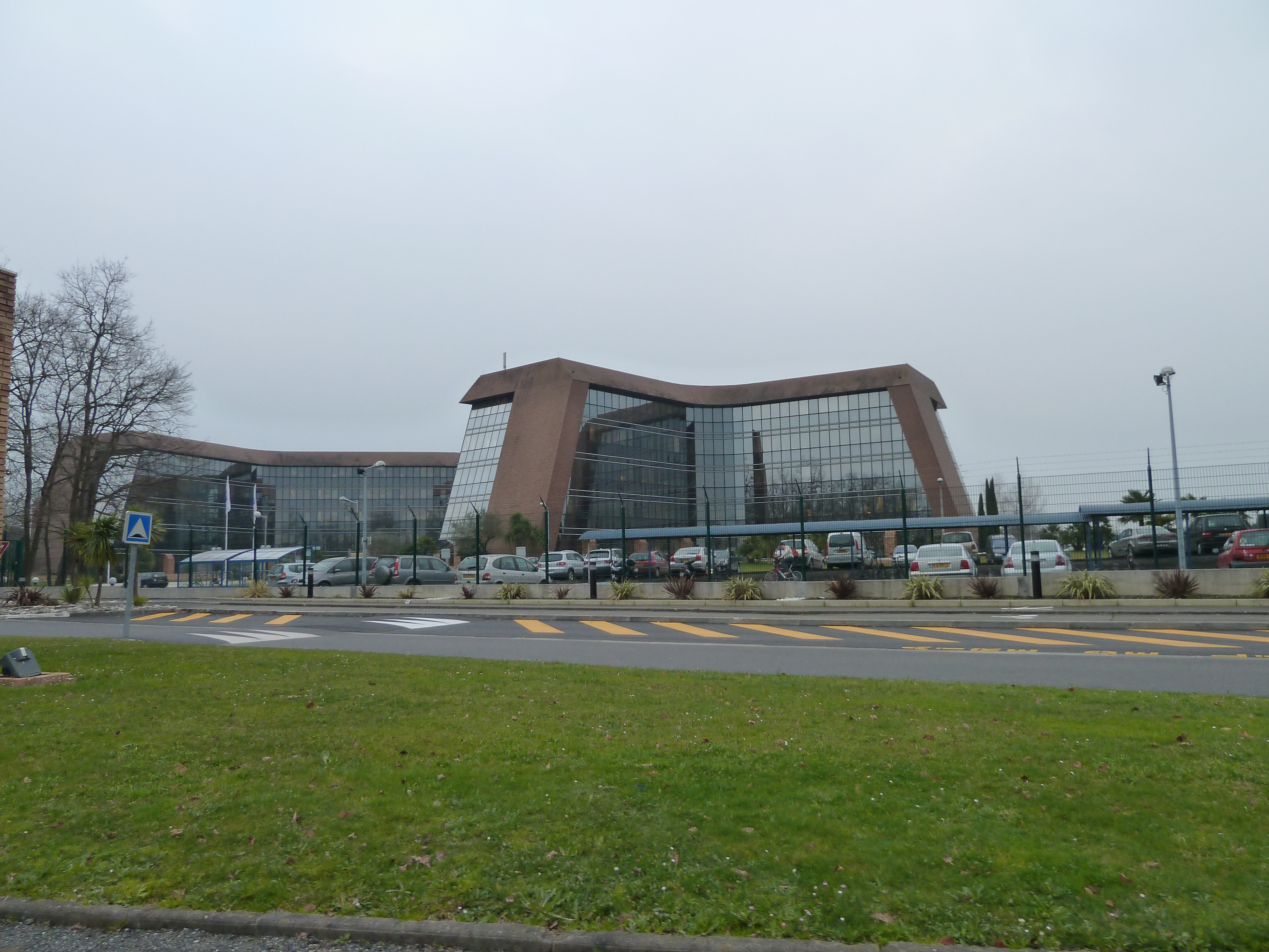 Centre scientifique et technique Jean Féger